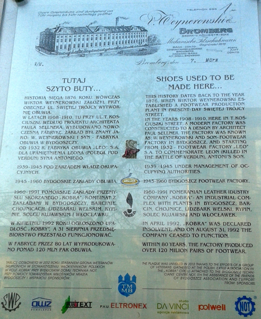 Tablica pamiątkowa Pomorskich Zakładów Przemysłu Skórzanego „Kobra” przy ul. Kościuszki 27 w Bydgoszczy